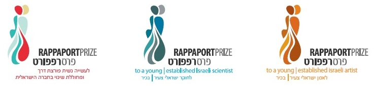 פרס רפפורט